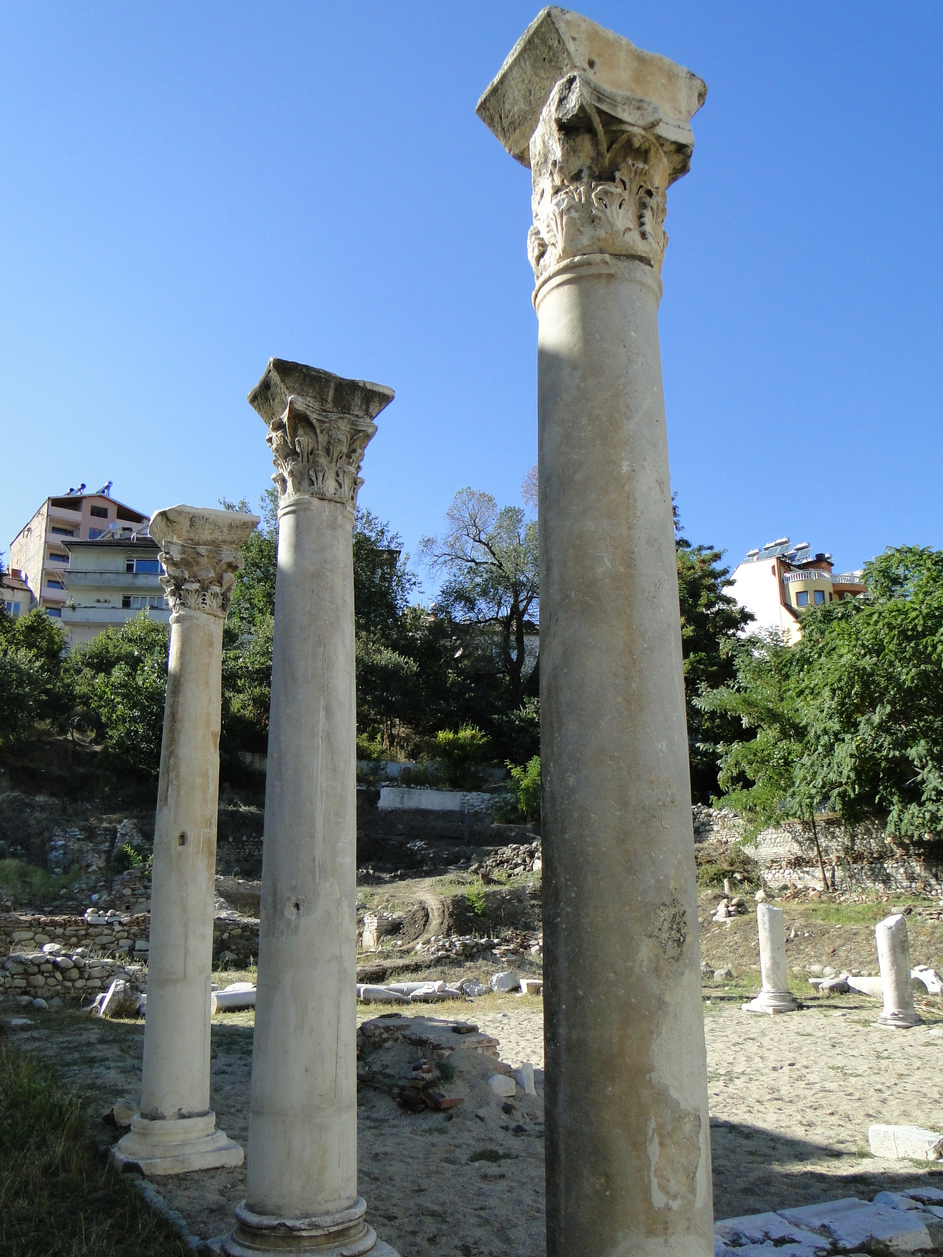 Сандански